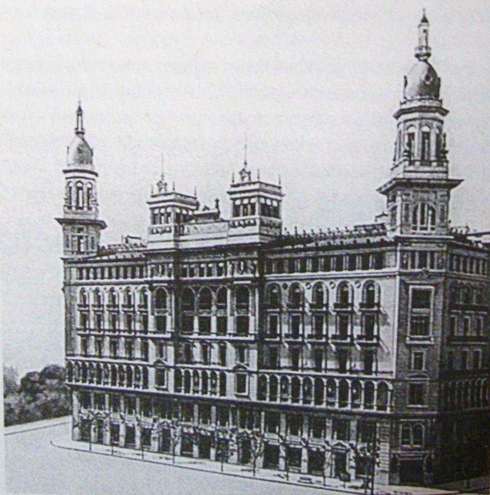 Vista del Edificio de la Compañía de Seguros "La Inmobiliaria" hacia la década de 1910. En la planta baja funcionó la casa Heinlein de accesorios de baño, por lo que el edificio también fue conocido como "Palacio Heinlein". Av. de Mayo, entre San José y Pte. Luis Sáenz Peña. Barrio de Monserrat, ciudad de Buenos Aires, Argentina.